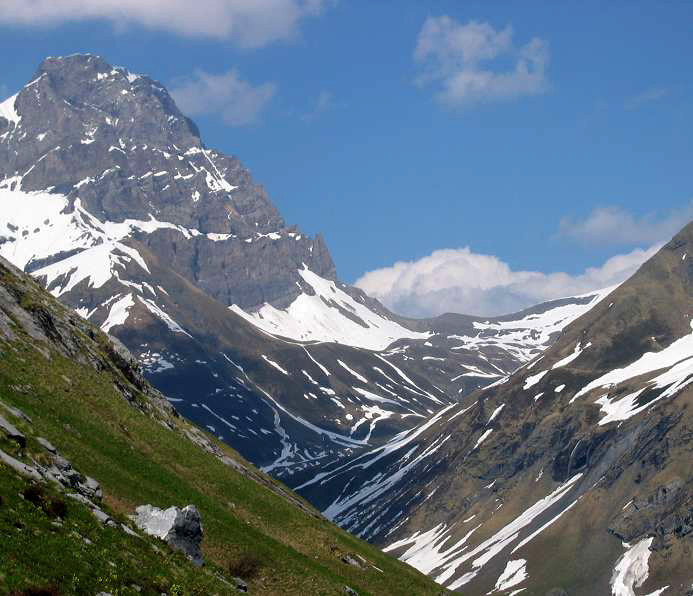 Blackenstock, 2931m, und Surenenpass, 2291m, Kanton Uri, Schweiz